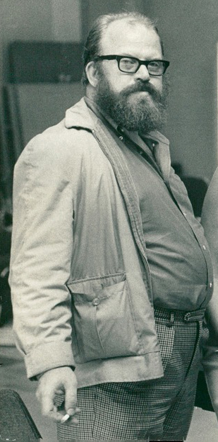 Ernst Günther.